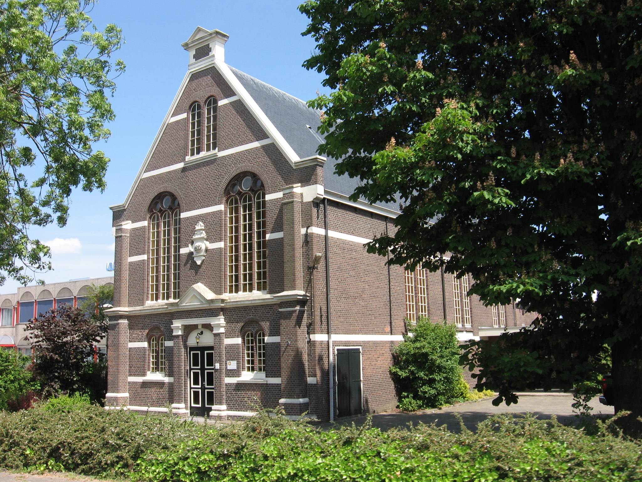 Zwammerdam